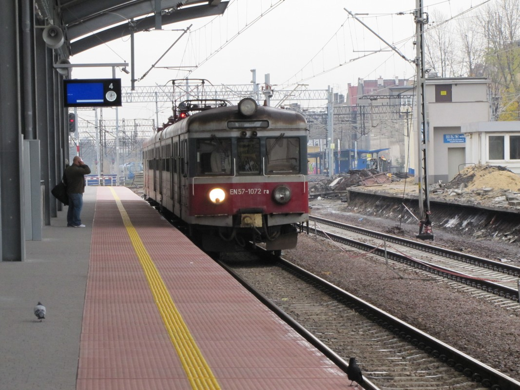 PKP. POCIĄG NA STACJI.